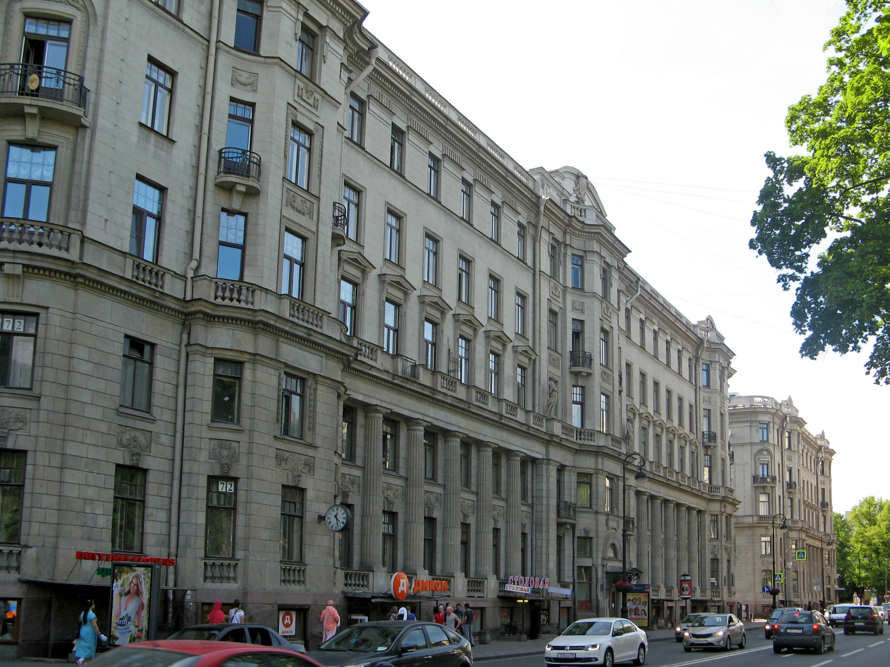 Дом, где в 1926-1934 гг. в квартире 20 жил секретарь Ленинградского губкома ВКП(б) Киров С.М. (Комплекс зданий Первого Российского страхового общества): Каменноостровский проспект, 26-28, Петроградский район, Санкт-Петербург